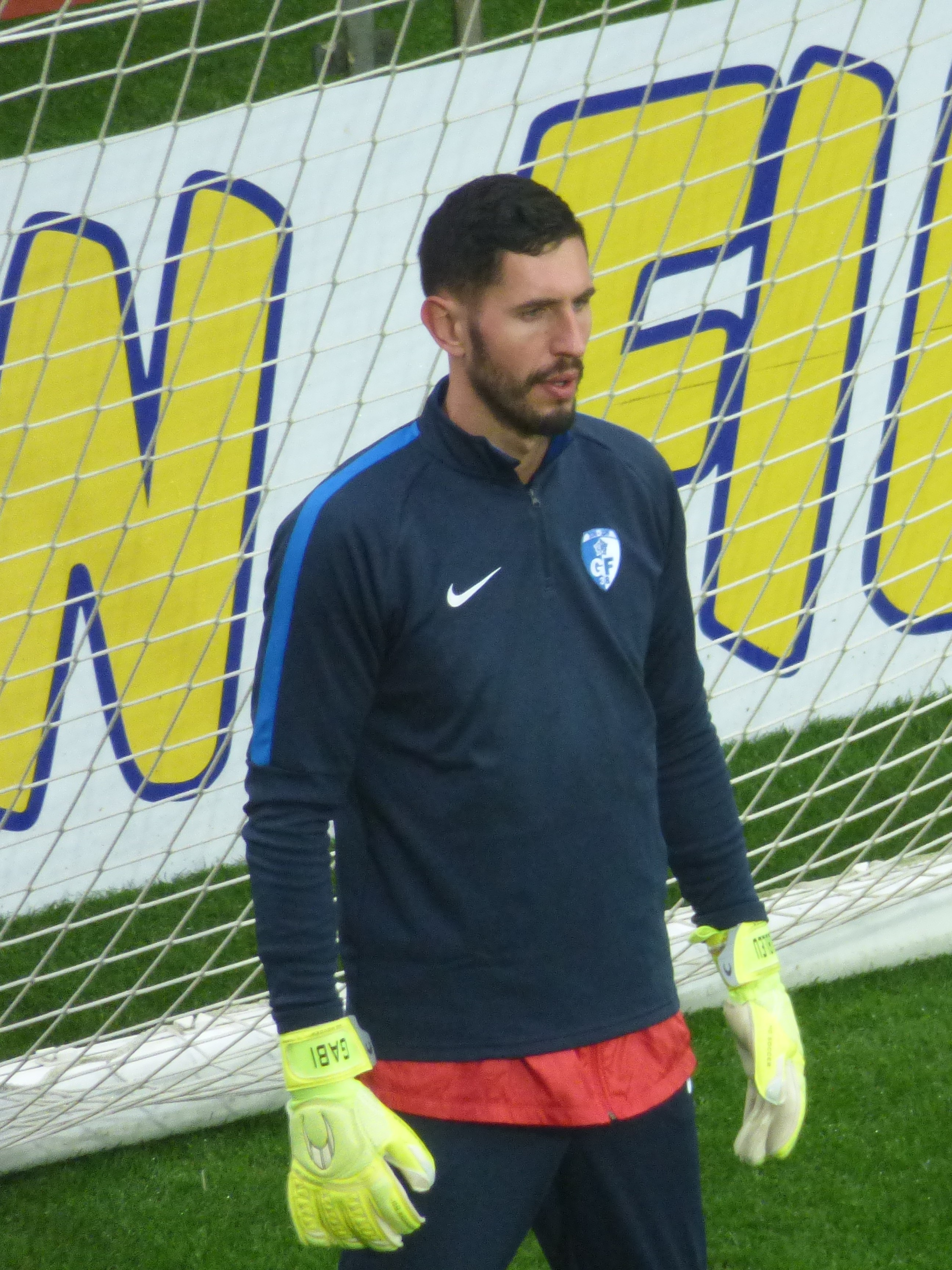 Brice Maubleu avant le match RC Lens / Grenoble Foot 38, le 24 novembre 2018, comptant pour la quinzième journée du championnat de France de football de Ligue 2 2018-2019, au Stade Bollaert-Delelis.